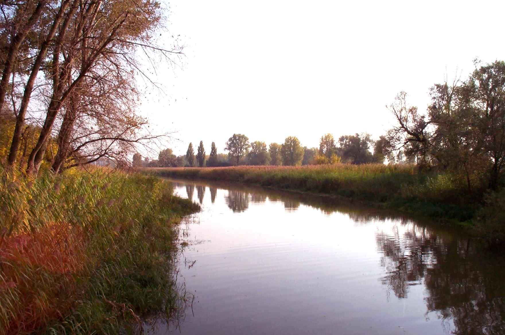 Typische Riedlandschaft im Hessischen Ried: Blick zum Altrheinschutzgebiet Biedensand im Naturschutzgebiet „Lampertheimer Altrhein“ in Lampertheim